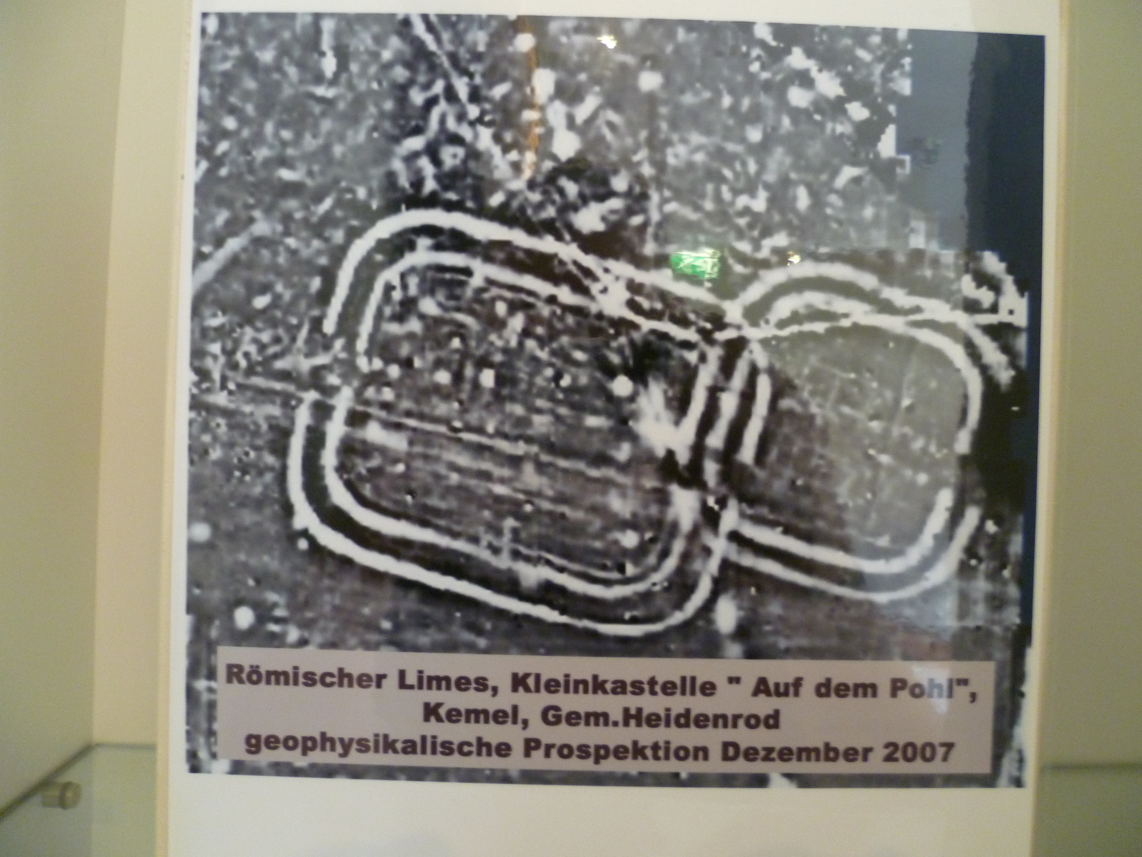 Geologische Prospektion an den Kastellen Kemel abfotografiert in der Limesausstellung am Hofgut Georgenthal